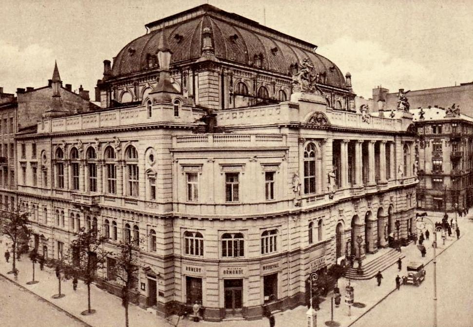 Warsaw, Filharmonia Narodowa, ca 1910